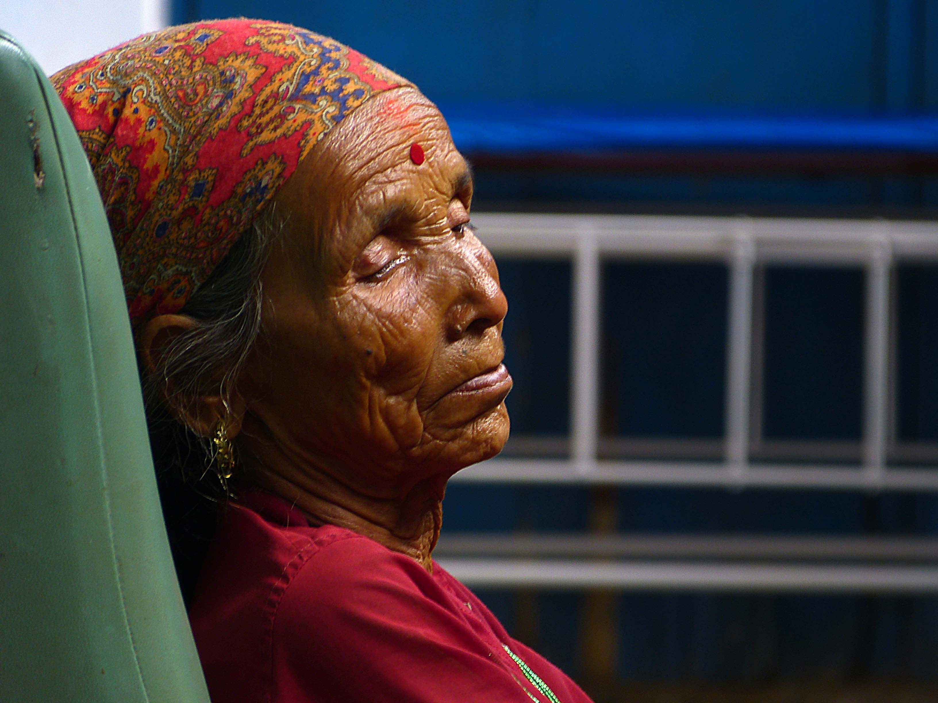 Nepalesische Patientin im Amppipal Hospital